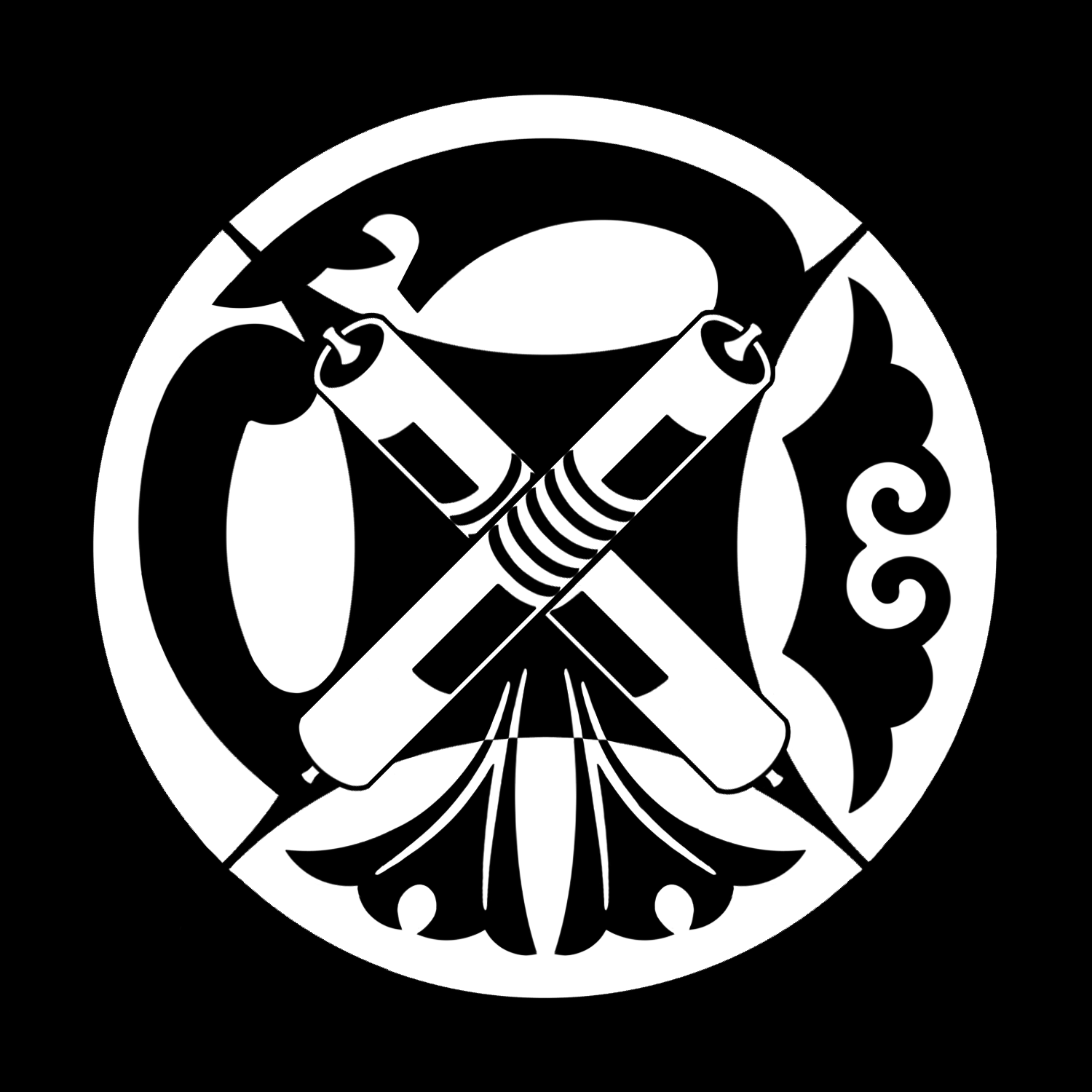 「七宝に祇園守」紋（染抜）